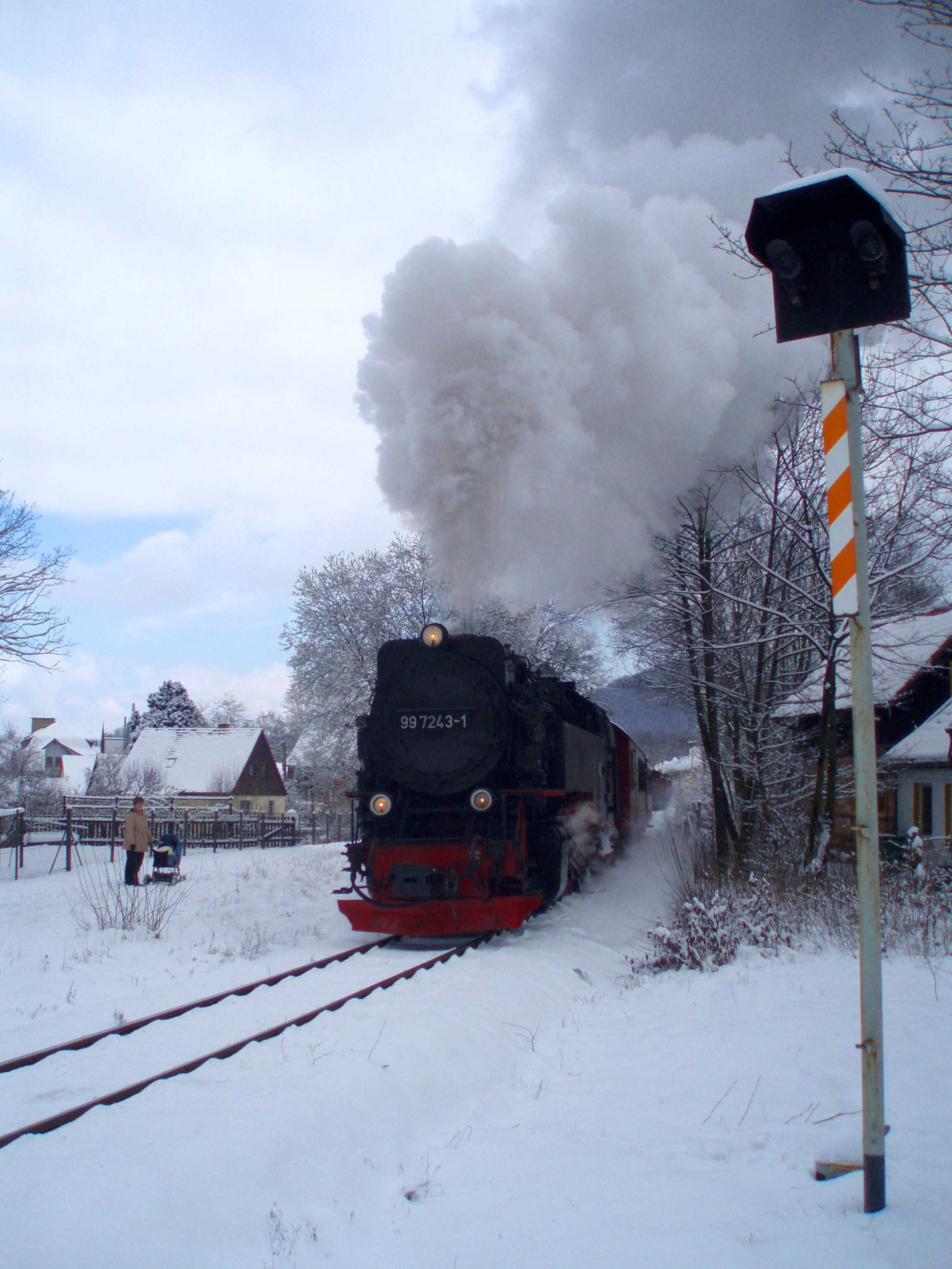 Brockenbahn 997243-1 verlässt den Bahnhof Hasserode